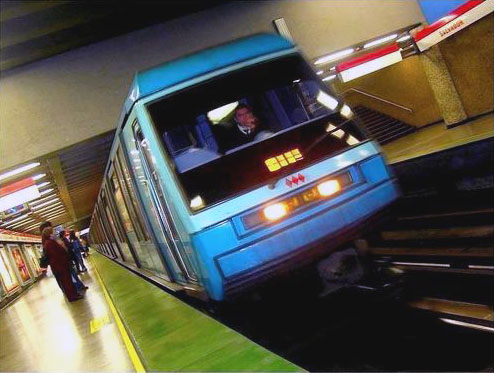 Estación Metro Salvador.